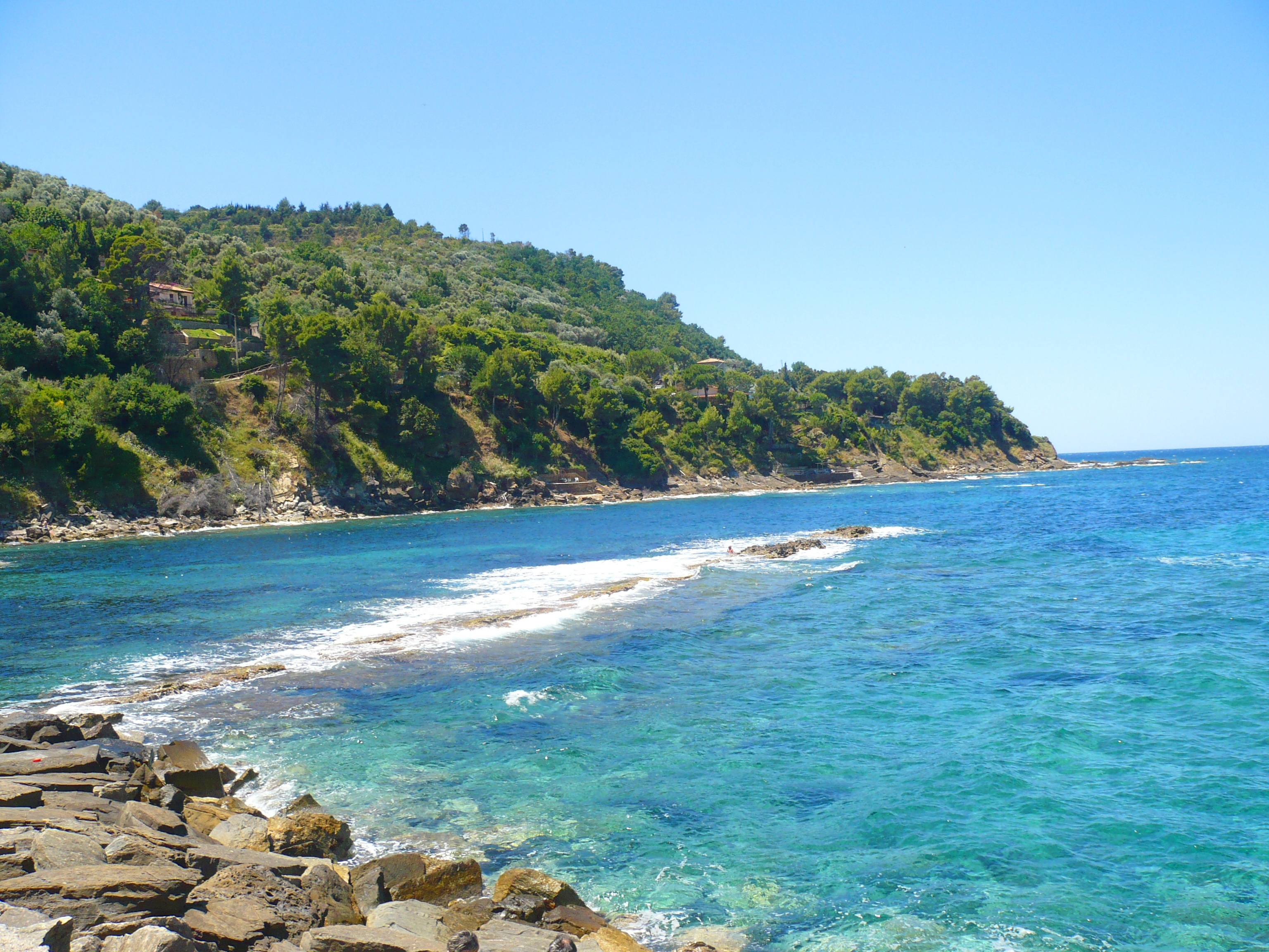 i resti del semisommerso porto greco-romano a s.marco di castellabate (salerno)